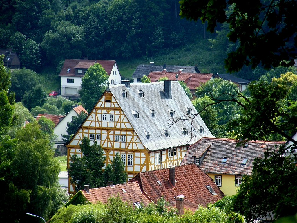 Ehem. Jagdschloss/Bergamt in Thalitter (Aufnahme von der Itterburg)